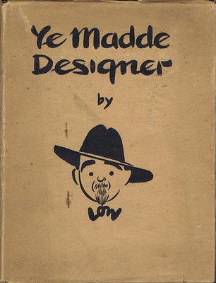 Cover of Ye Madde Designer.